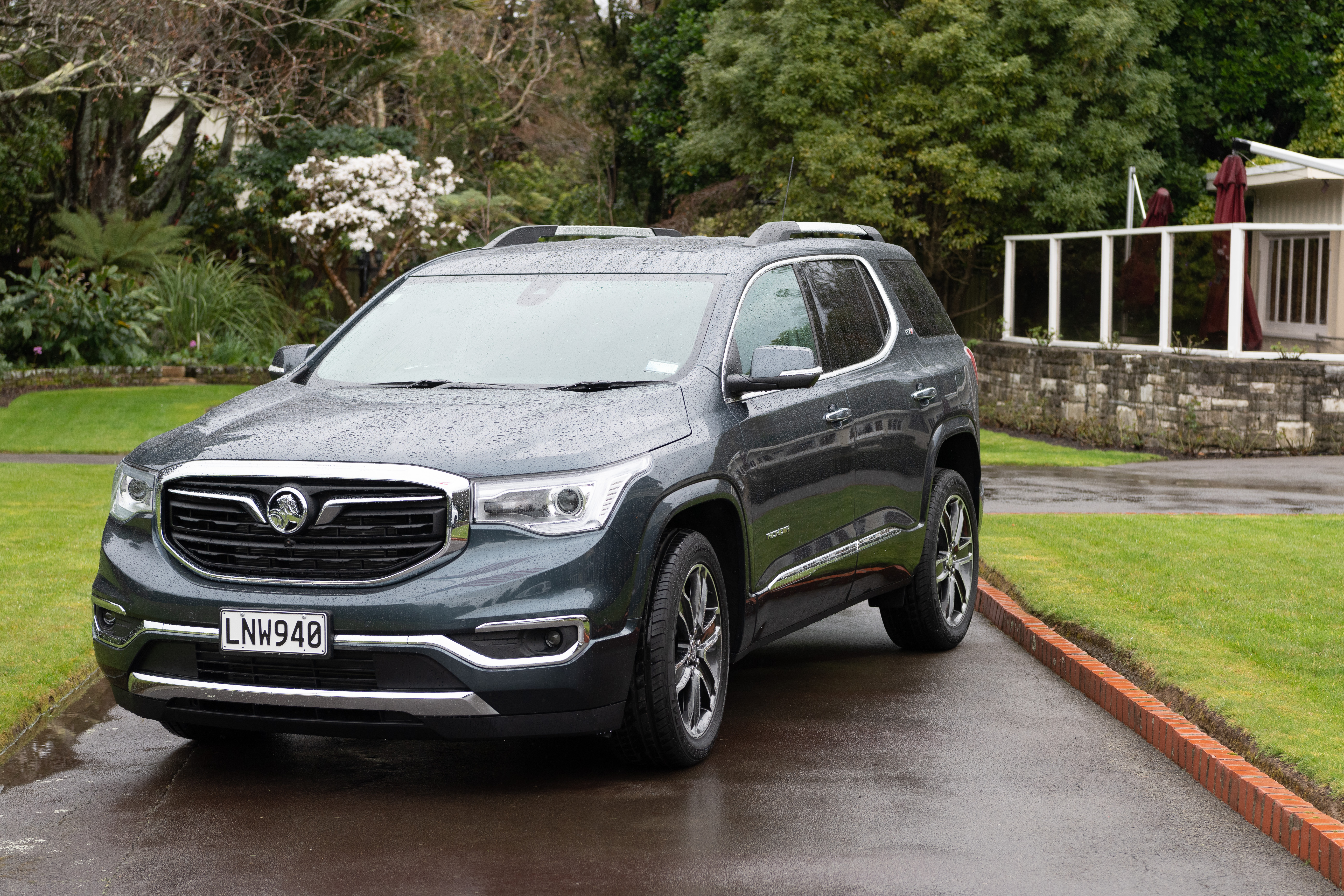 Holden Acadia Launch, 29 August 2018